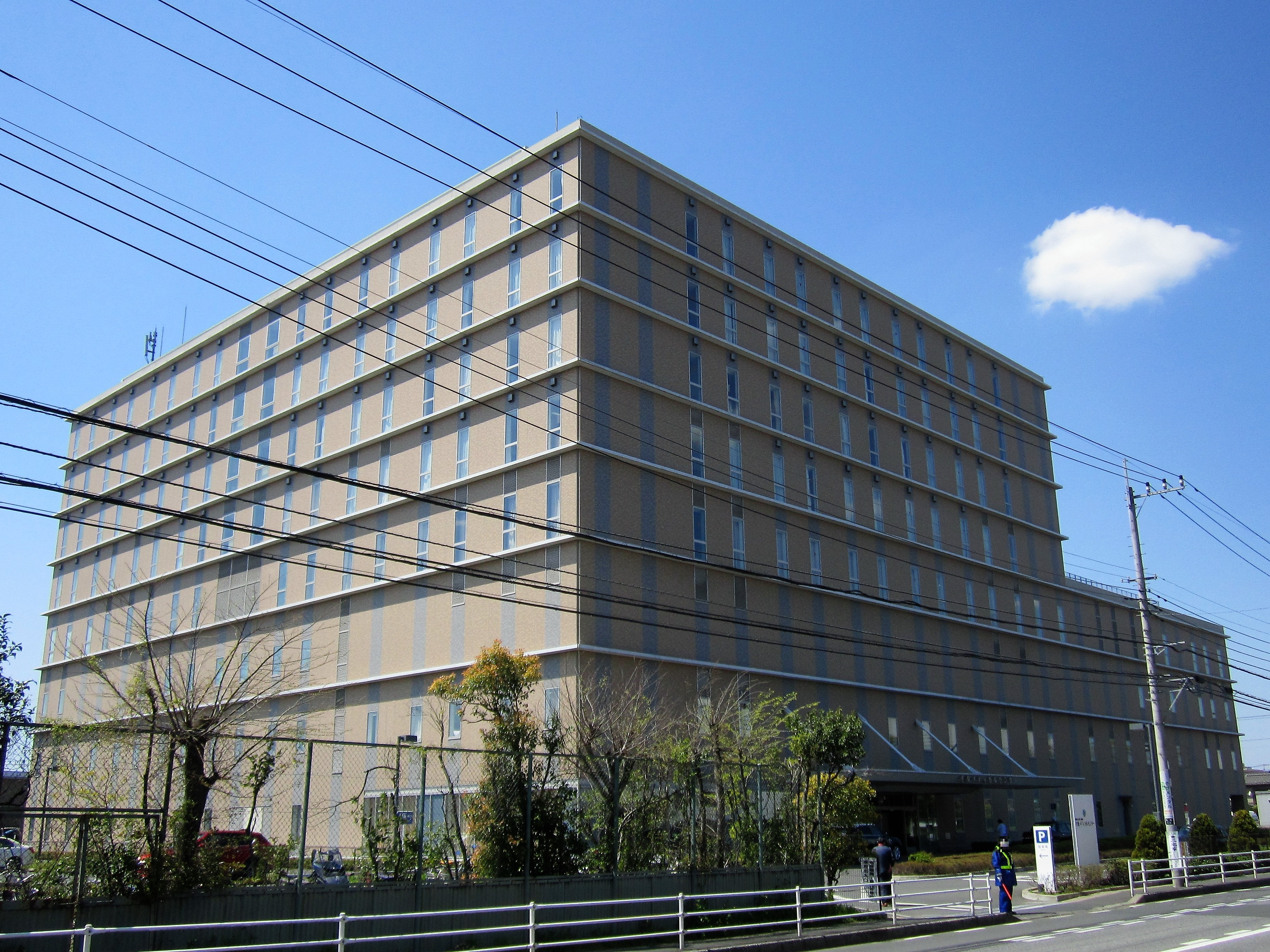 千葉メディカルセンター（千葉市中央区南町、2019年） Canon PowerShot A2200